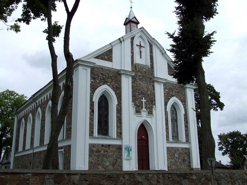 Dievo Apvaizdos church, Daugai, Lithuania.